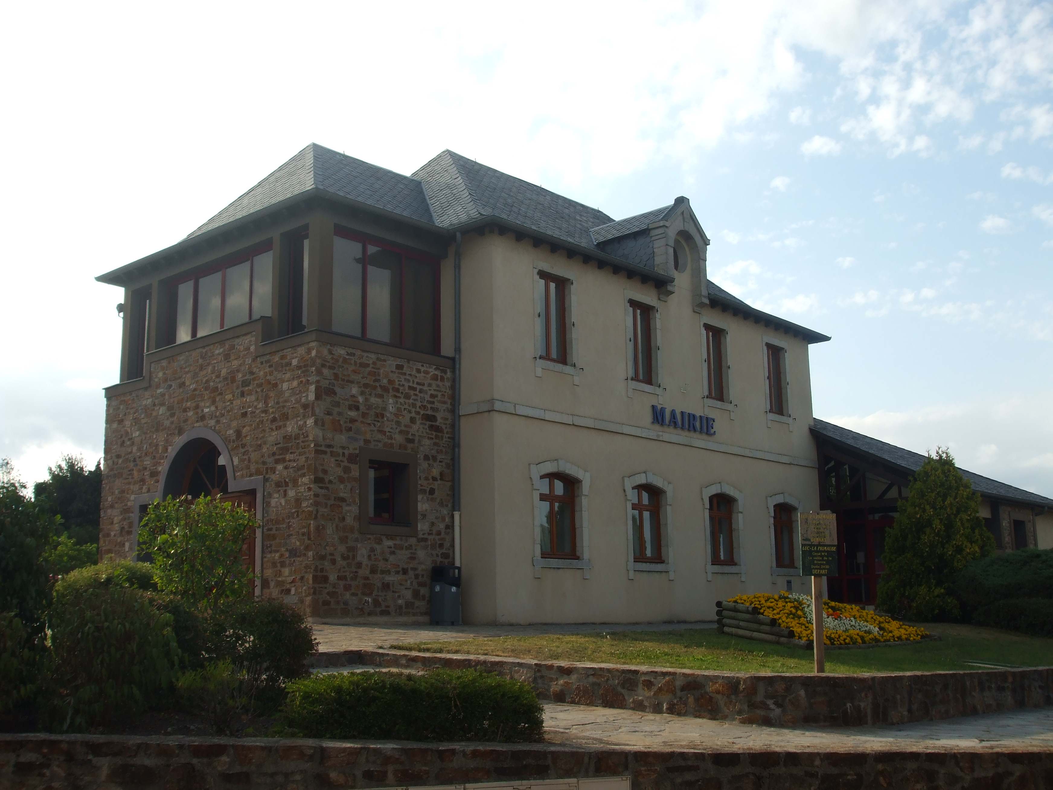 Hôtel de ville de Luc-la-Primaube